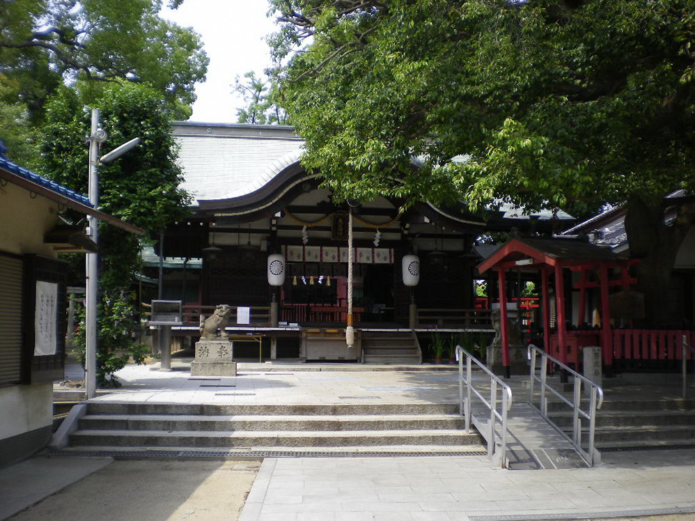 大阪市旭区の大宮神社